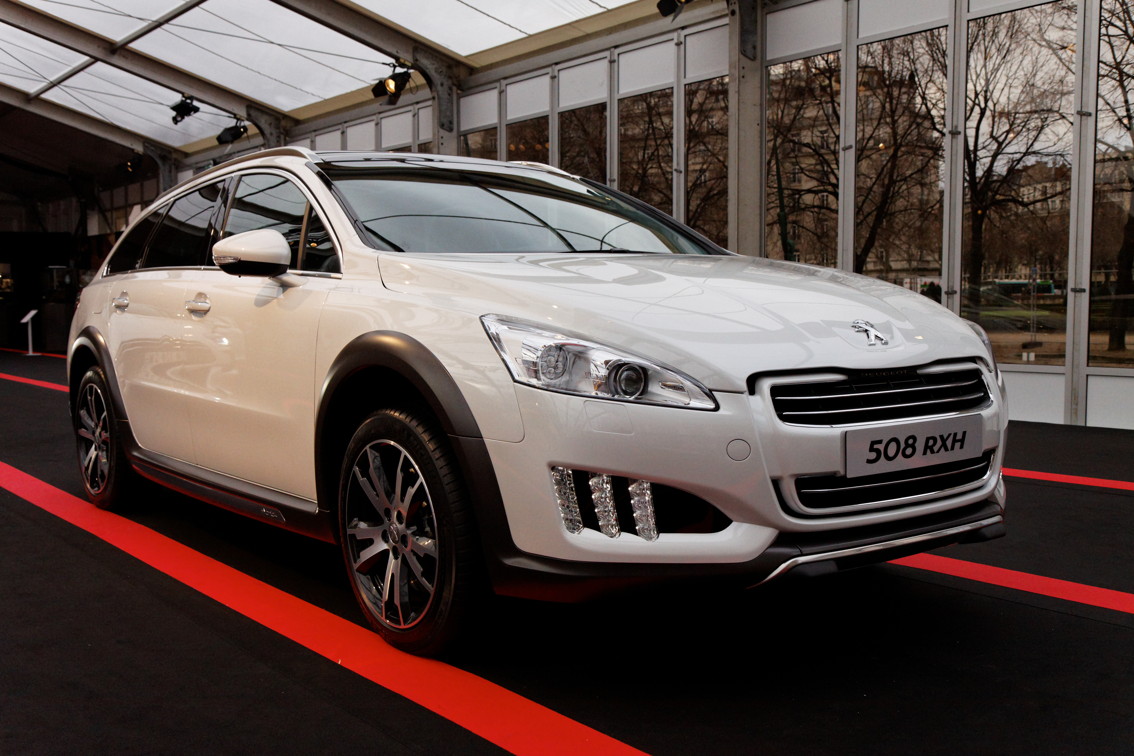 Peugeot 508 RHX